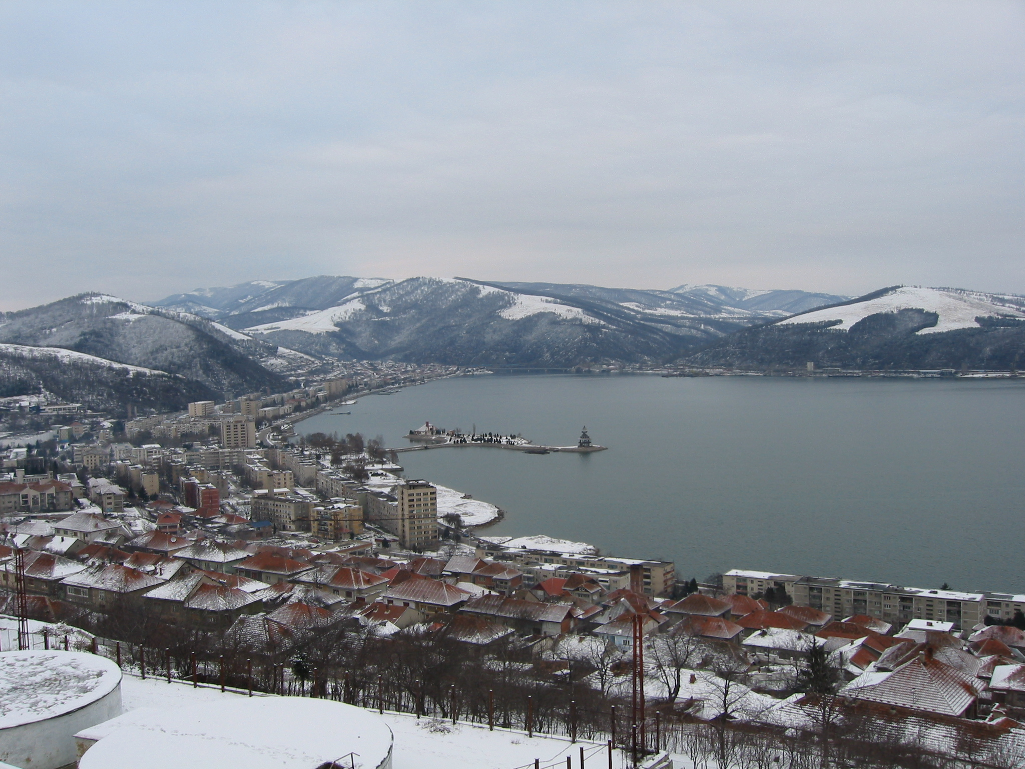 Orşova